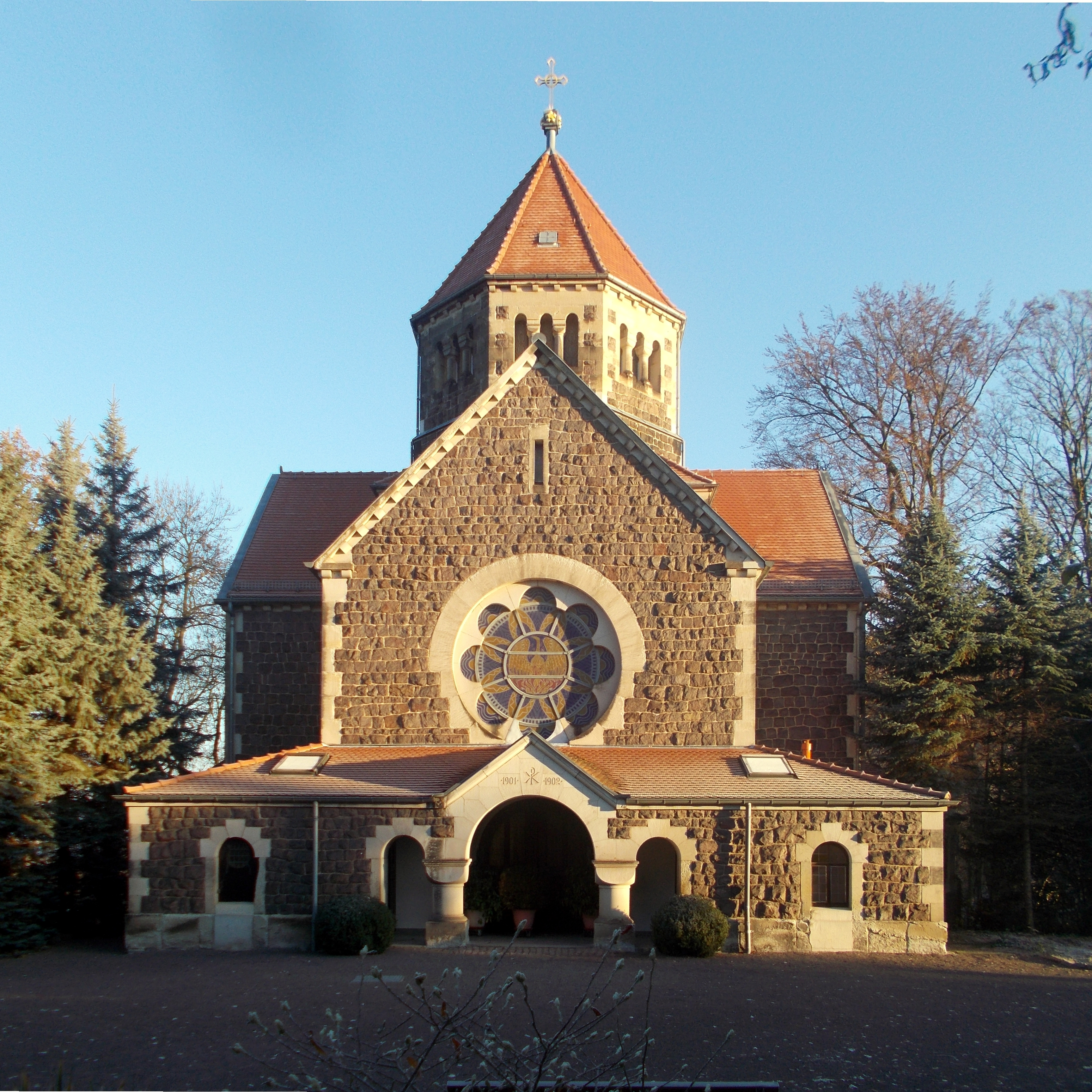 2016 Kapelle Johannisfriedhof Freital Deuben.jpg